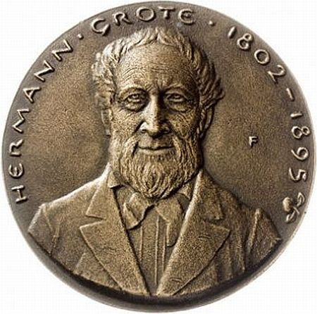 Gedenkmünze für den deutschen Numismatiker Herrmann Grote (1802-1895), zu dessen 100. Todestag. Bronzegußmedaille von W. Fitzenreiter/Gießerei Seiler, Schöneiche, 1995. (30 Exemplare). Ausstellung des Landesmuseums Hannover.